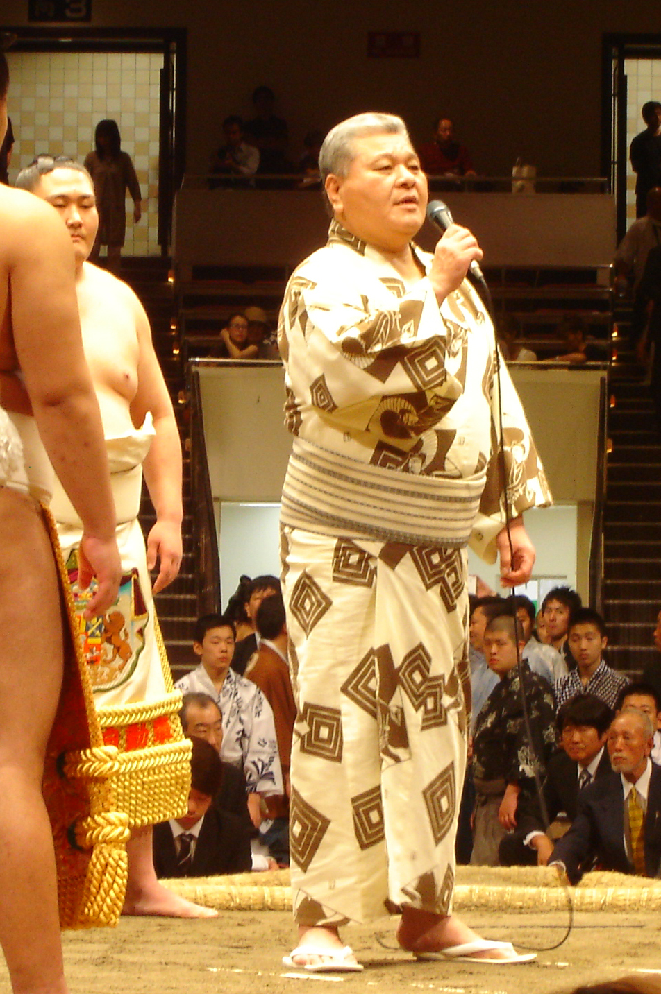 大納川憲治